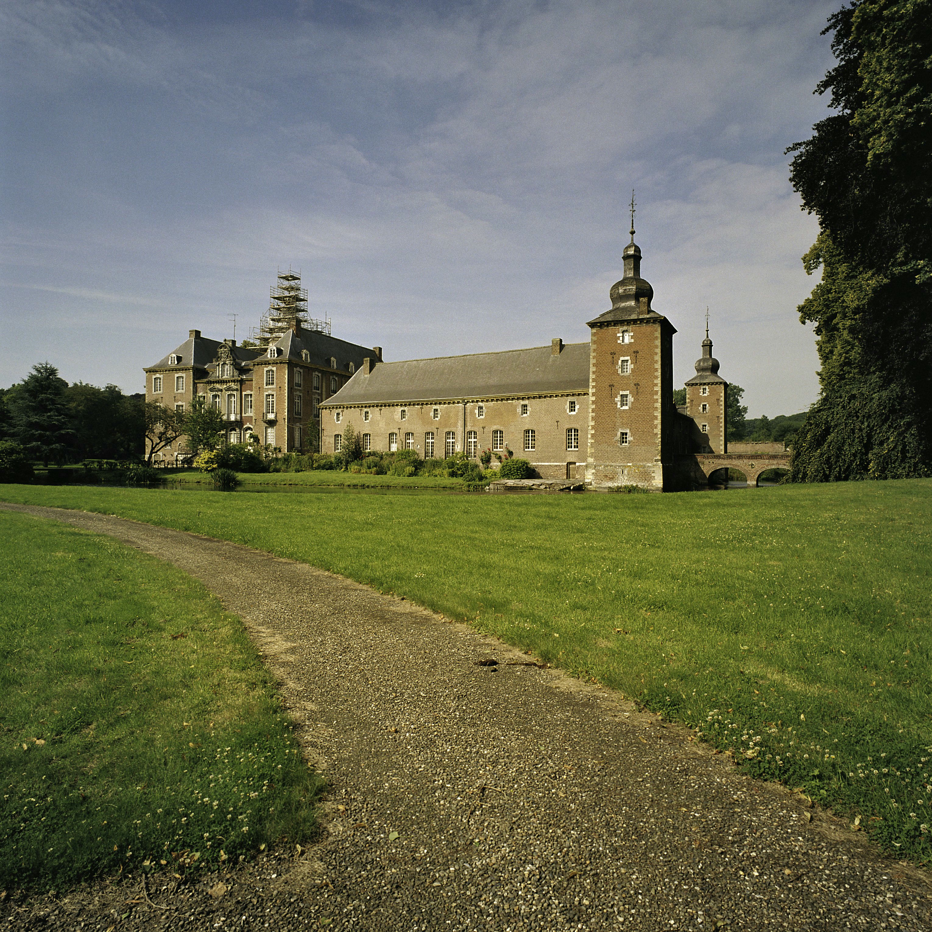 Kasteel Neubourg: Overzicht over de noordelijke voorburcht met stenen brug (rechts). Links het kasteel met de hoektoren in de steigers.